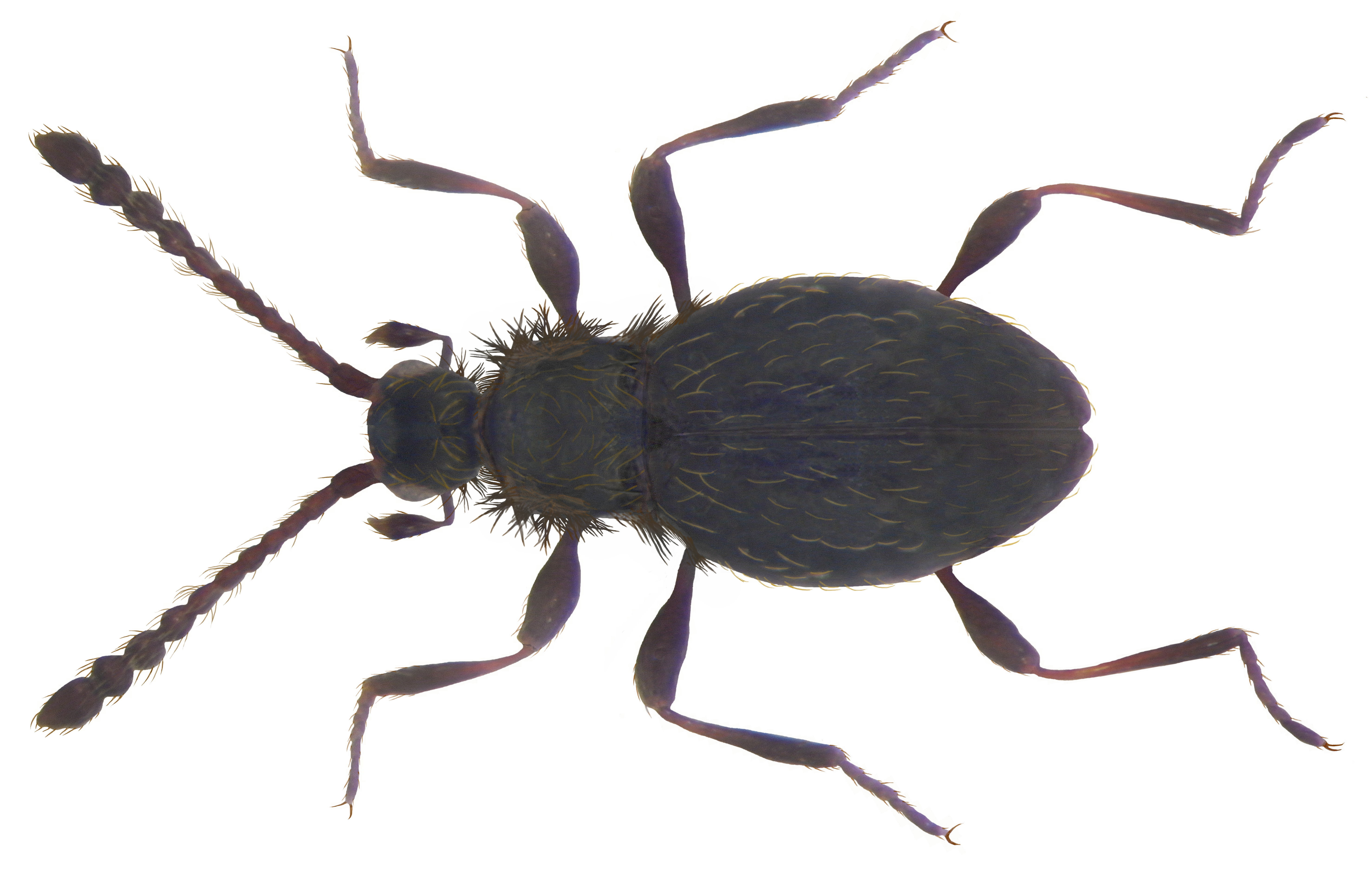 Familie: Scydmaenidae Groesse: 1,4-1,6 mm Verbreitung: Nord- und Mitteleuropa Ökologie: in faulenden Pflanzenabfällen Fundort: Germania, Thüringen, Gera, Dorna leg. A.Skale, 2002; det. U.Schmidt, 2002 Photo: U.Schmidt, 2009